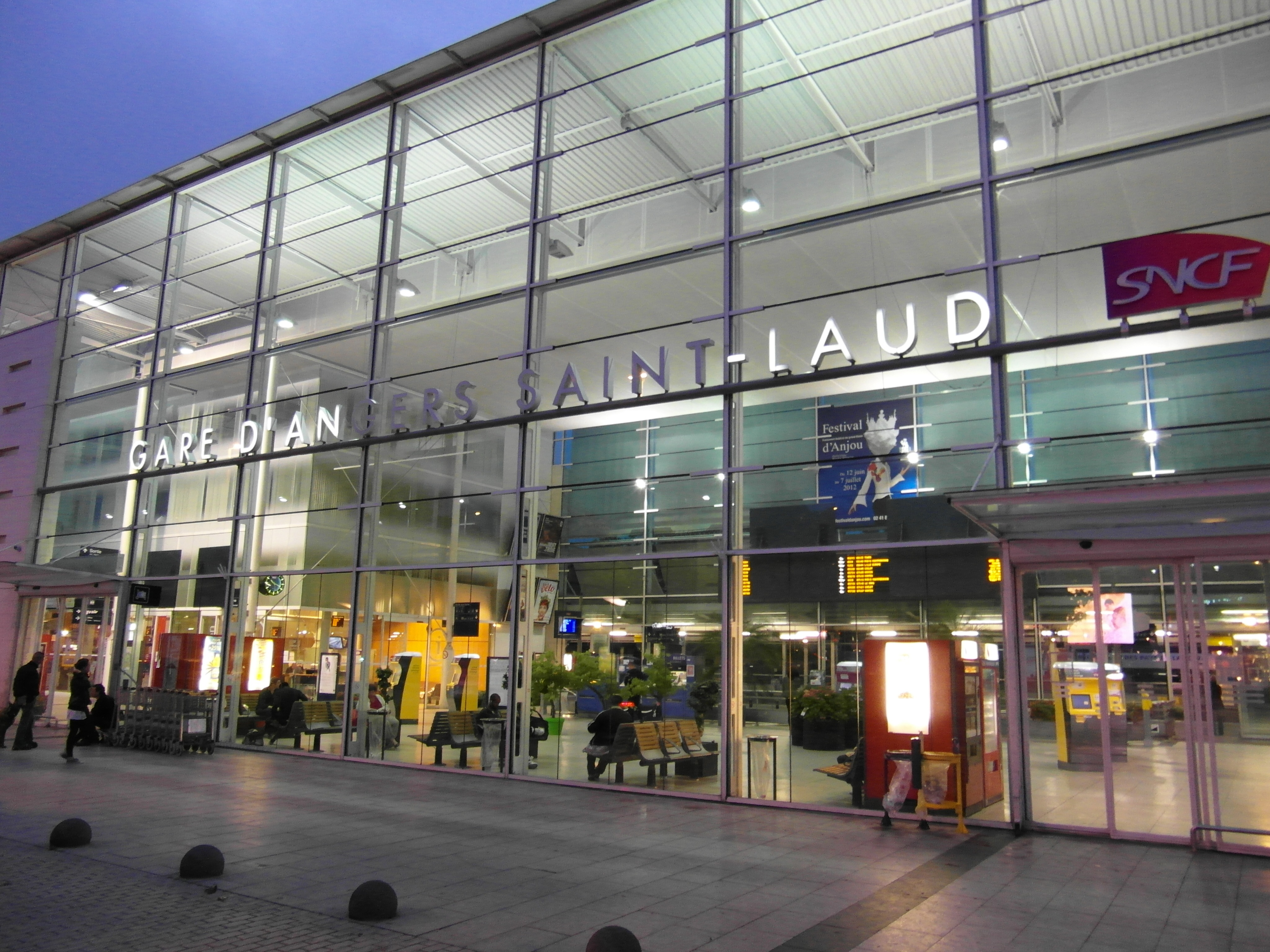 Angers - Gare Saint-Laud